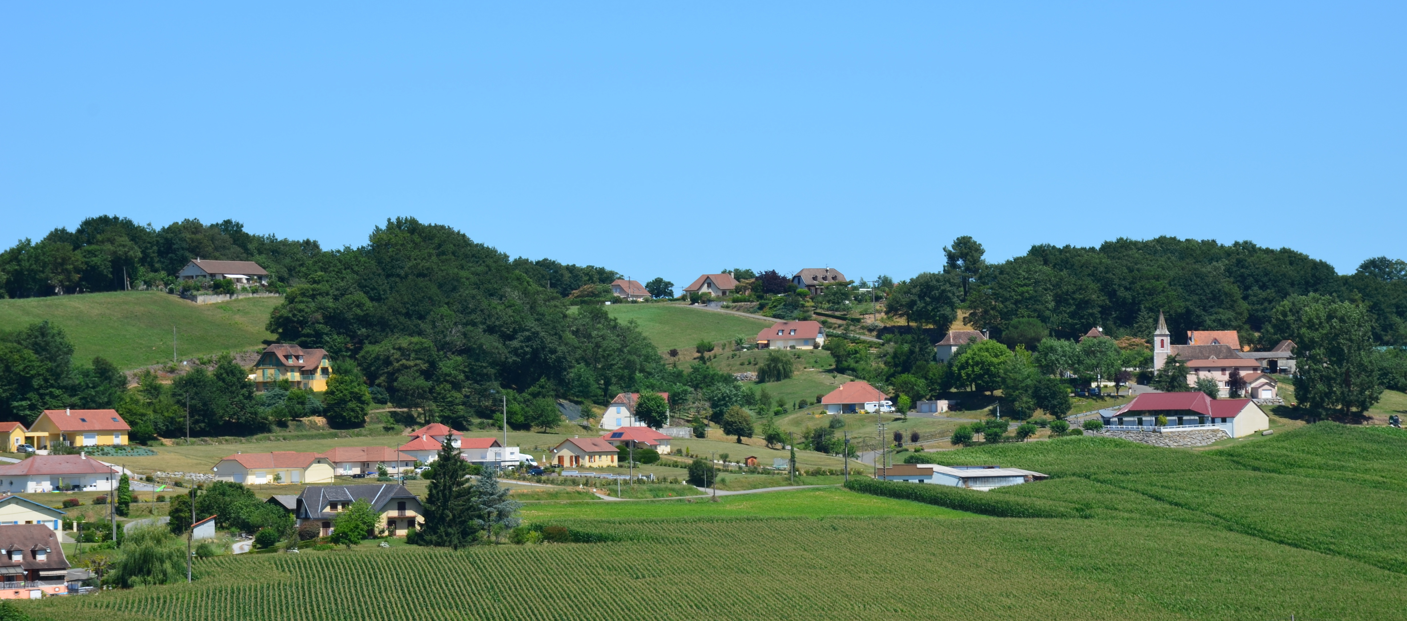 Photo panoramique du centre du village béarnais Balansun